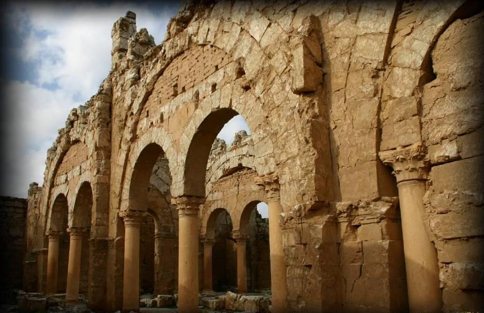 Basilica della St. Croce /Heilig-Kreuz-Basilika